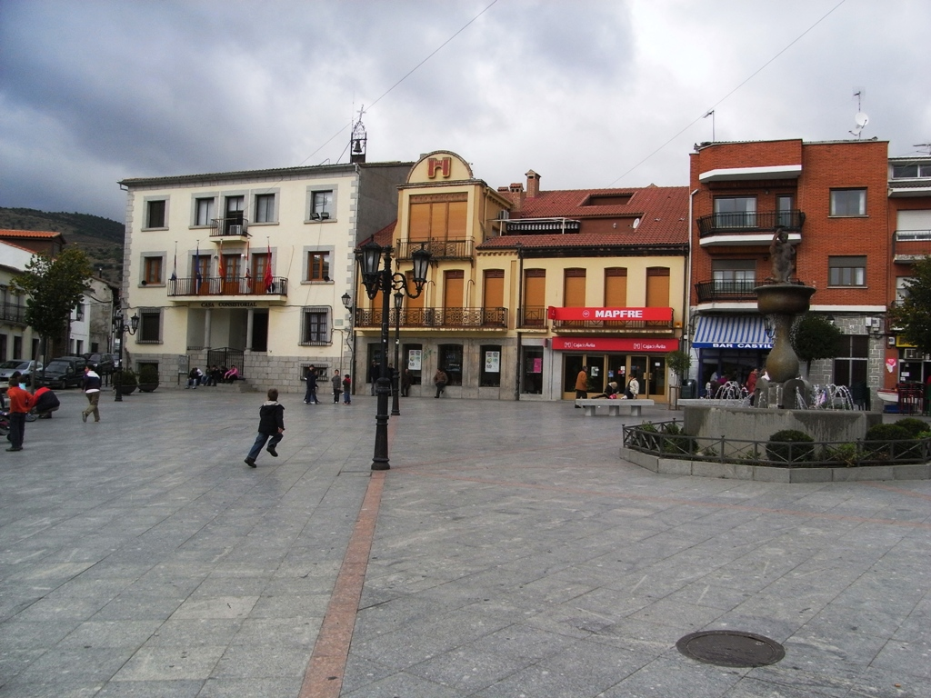 Plaza de Cebreros